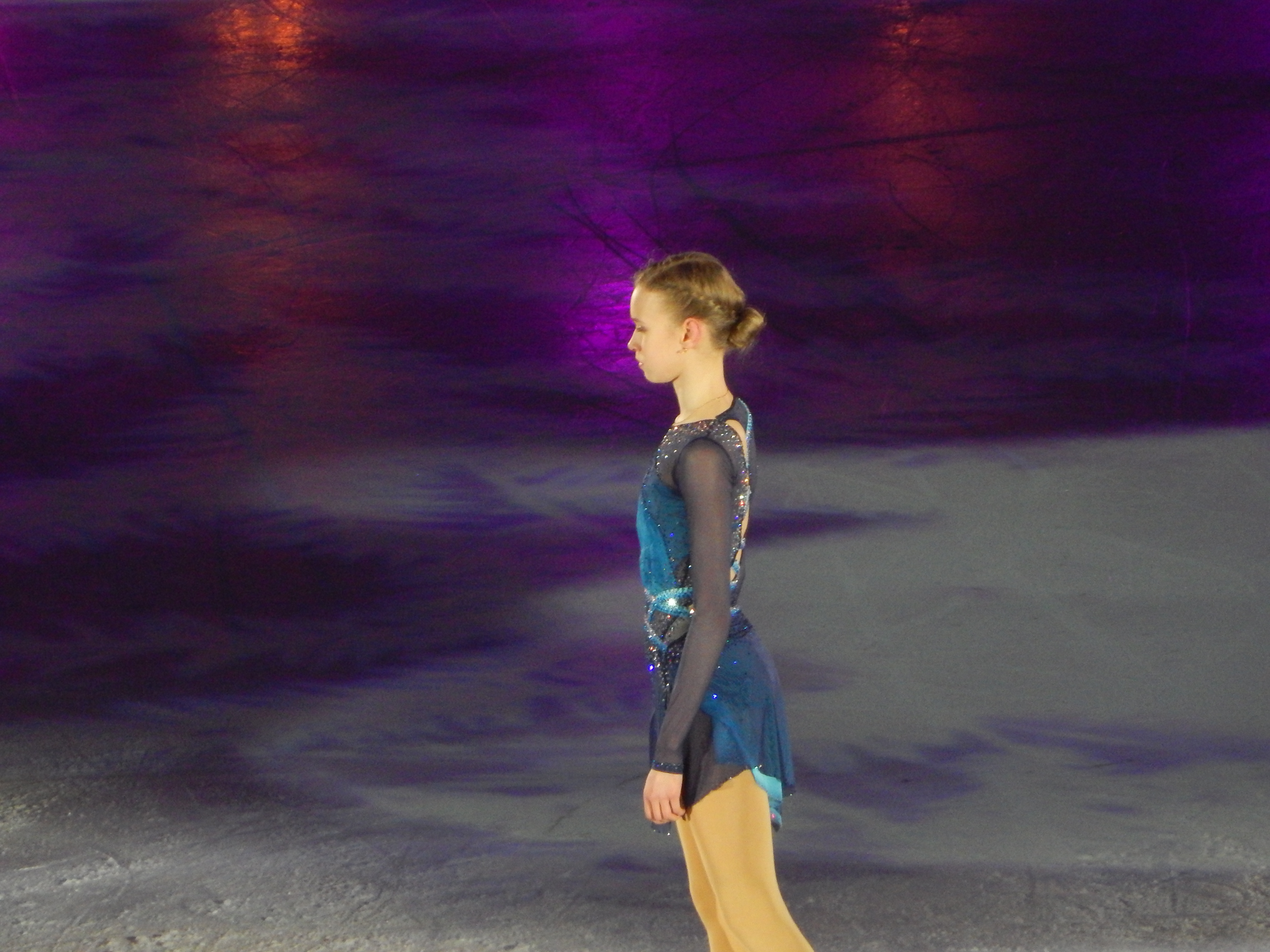 Майя Хромых во время выступления в шоу "Путь к победе", 26 февраля 2020 года, ВТБ Арена, Москва